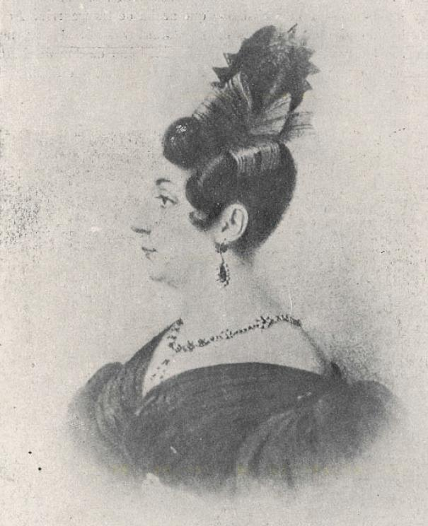 Mercedes Marín del Solar (1804-1866), primera poetisa e intelectual chilena, hija del integrante de la Primera Junta Nacional de Gobierno de Chile Gaspar Marín, de gran popularidad en su tiempo dedicó sus últimas años a la beneficiencia, la acción política y la educación de la mujer.